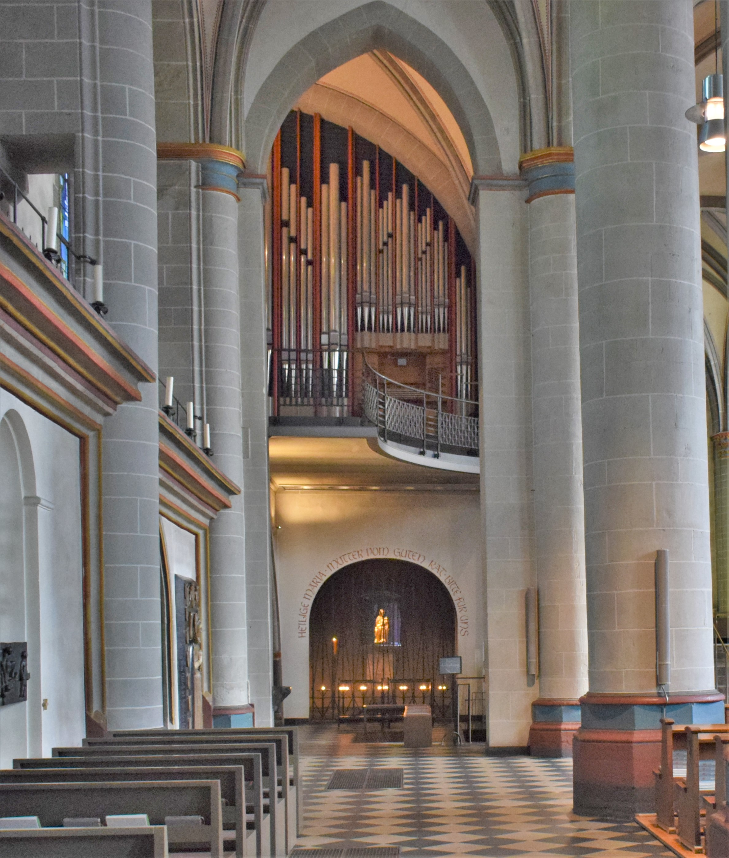 Vue de la cathédrale de Essen.